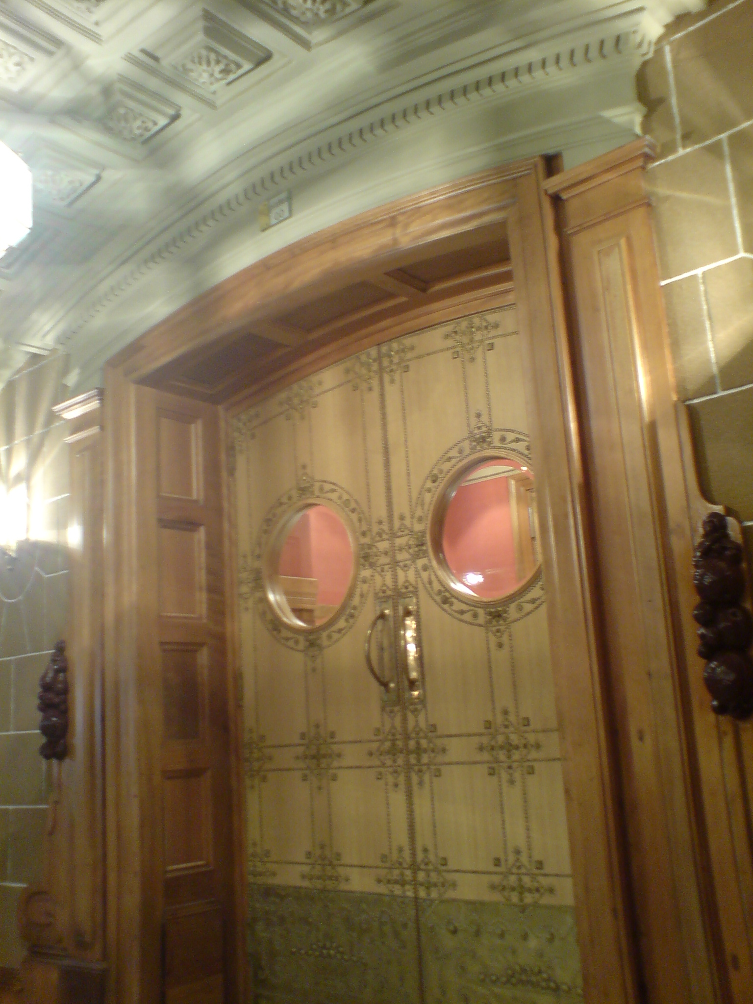 Teatro Pérez Galdós, acceso principal a platea. 2007 Las Palmas de Gran Canaria.